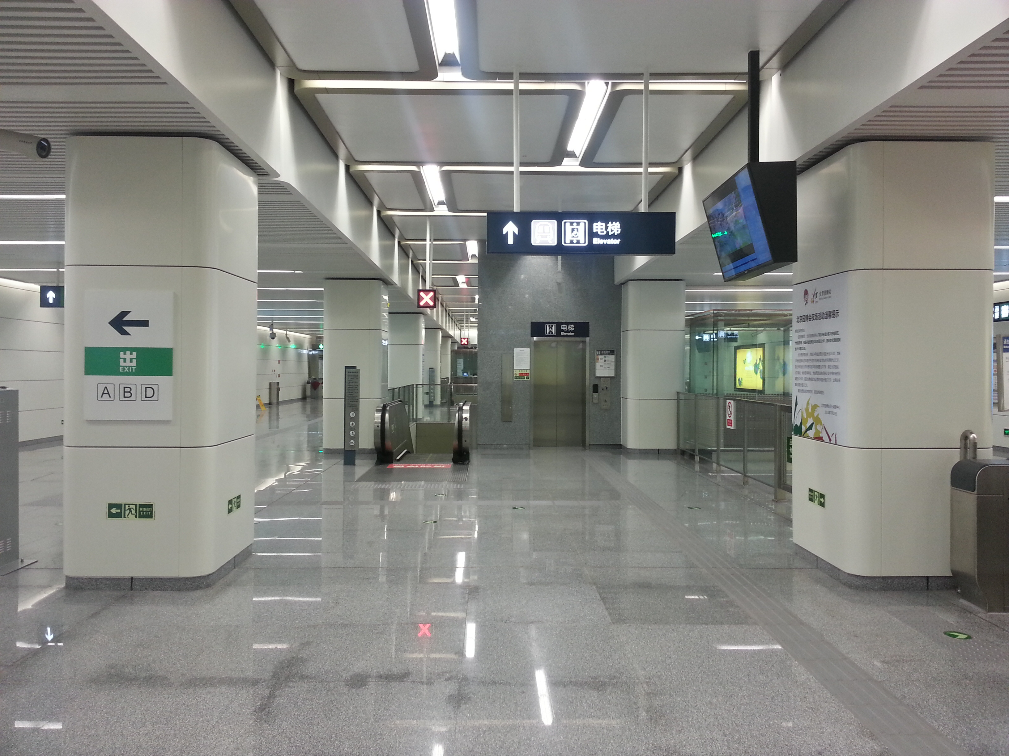 大瓦窑站站厅